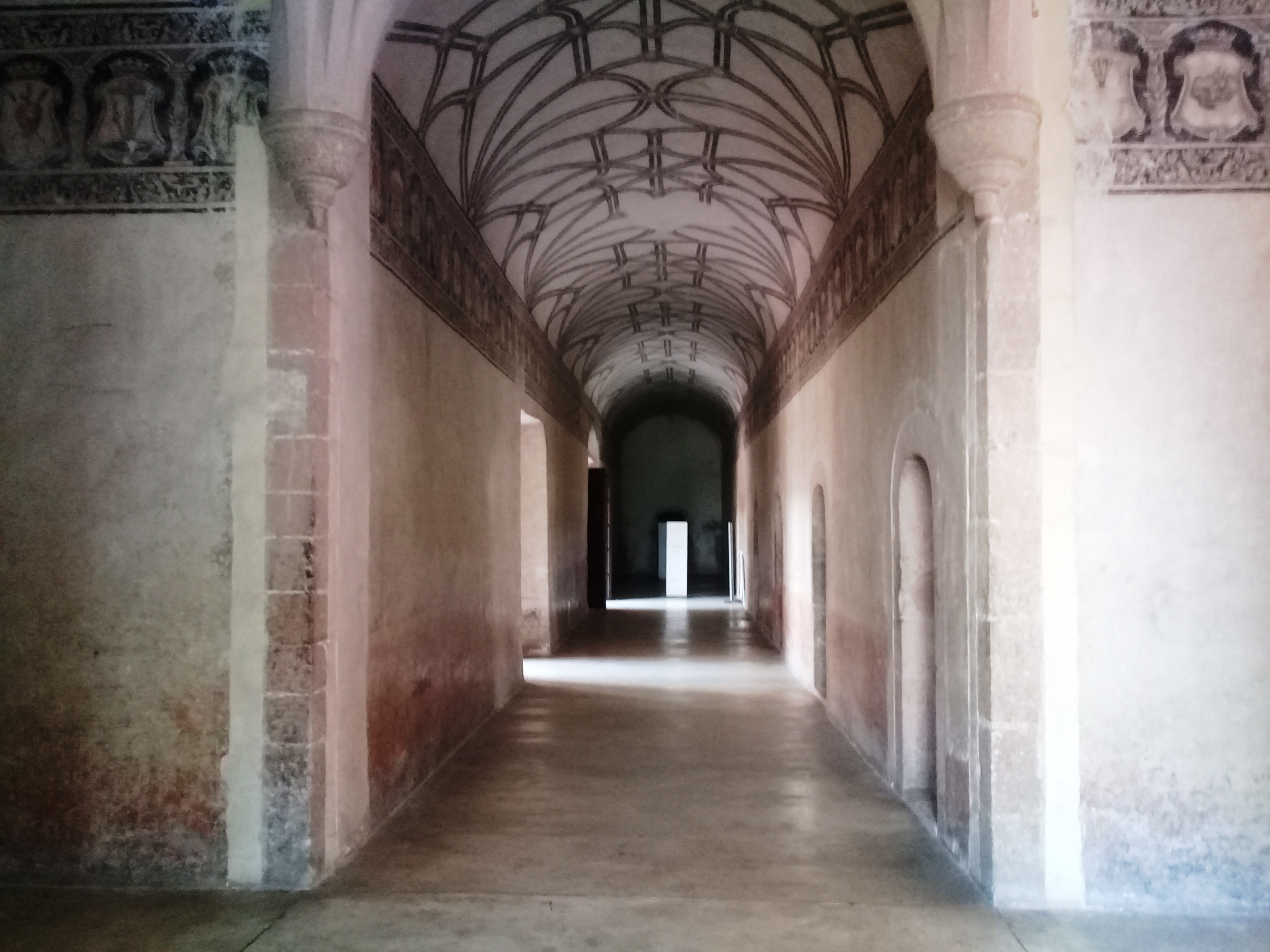 Templo y exconvento de San Nicolás de Tolentino (Actopan).